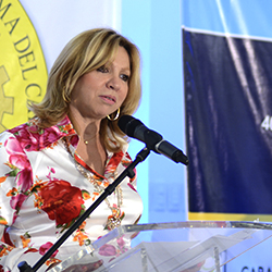 Abogada de la Universidad Simón Bolívar, presa en la carcel del Buen Pastor.